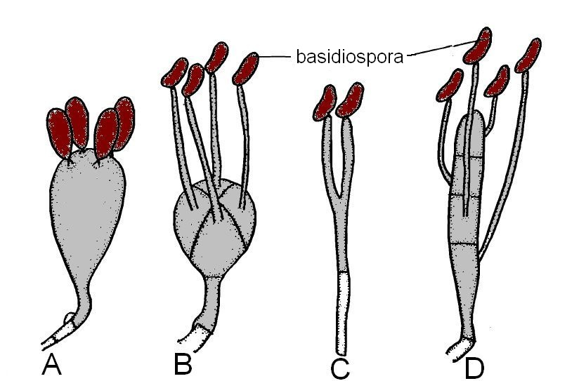 Basidium